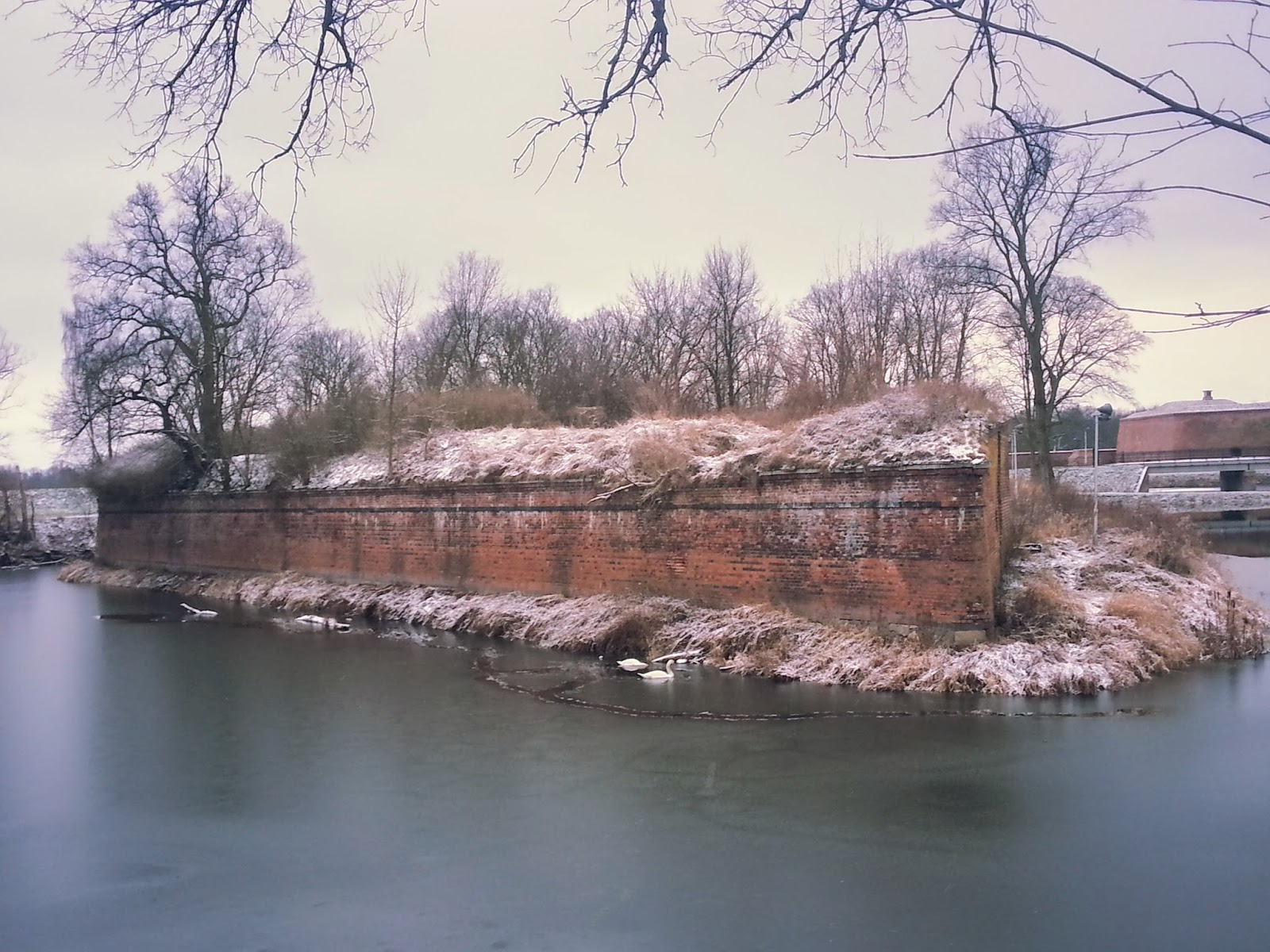 Rawelin August w Twierdzy Kostrzyn